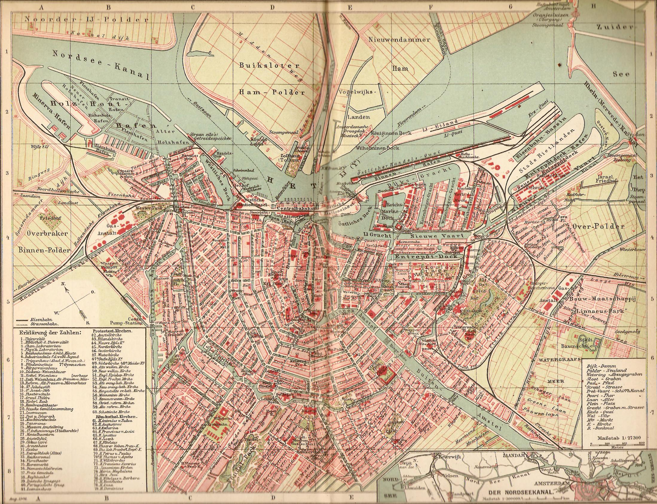 Kaart Amsterdam uit Brockhaus Konversations Lexikon 1901 Erster Band 'A - Athelm' Dit materiaal is in het publiek domein omdat het auteursrecht op dit materiaal is verlopen (de auteur is meer dan 70 jaar geleden overleden of het auteursrecht ligt bij een niet-natuurlijk persoon en het materiaal is meer dan 70 jaar geleden gepubliceerd). Het meer dan 100 jaar oude, in mijn bezit zijnde, boek bevat geen copyright aanduidingen.